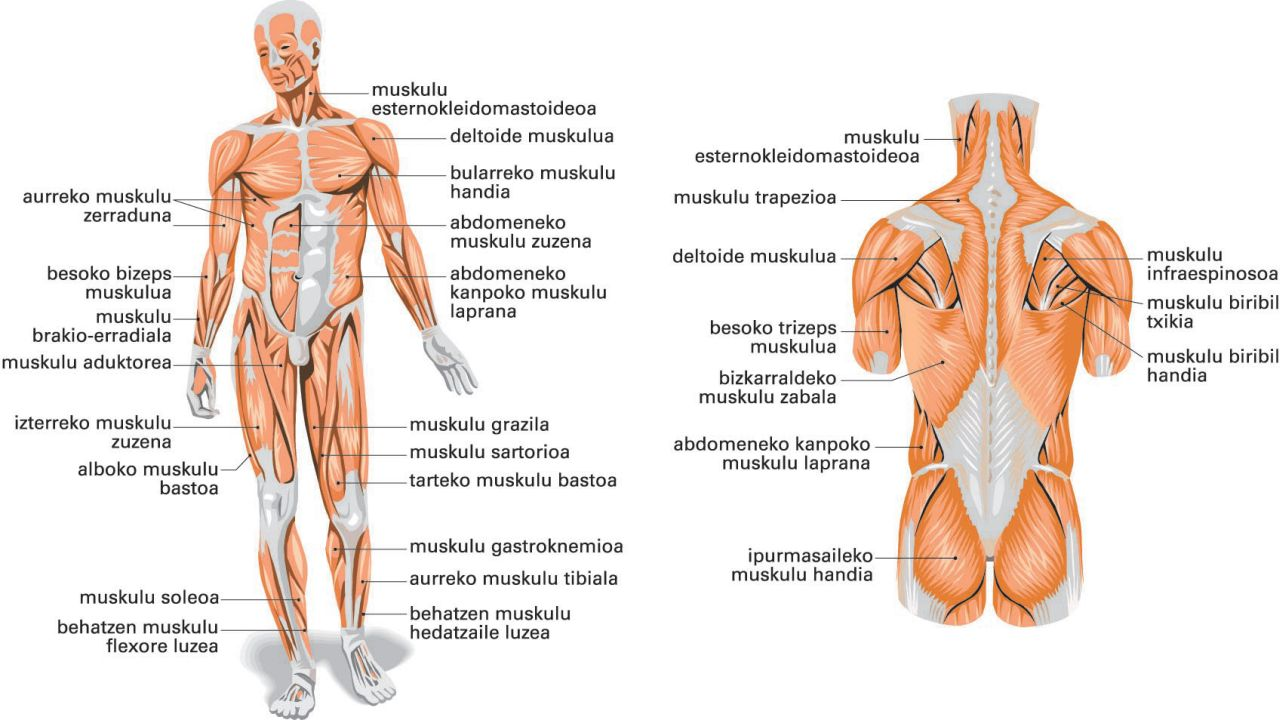 Giza muskulu sistema